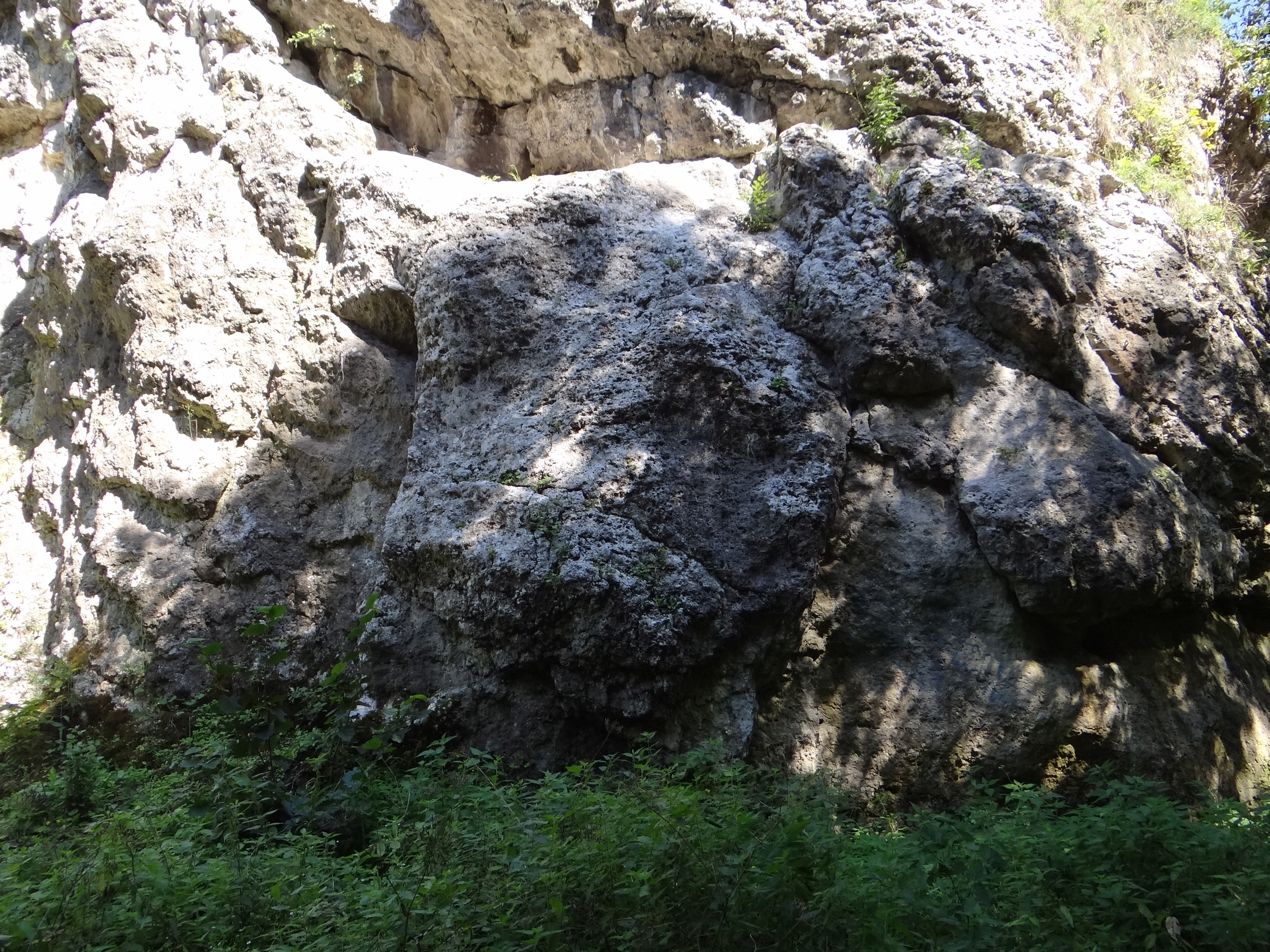 Skała Zamczysko w Dolinie Kluczwody